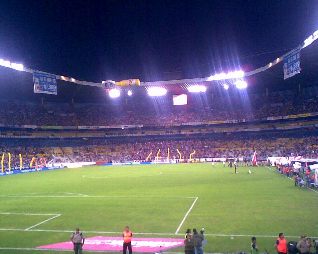 Estadio Jalisco en la pparte sur